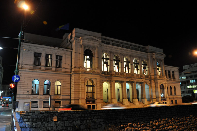 npsa night 2